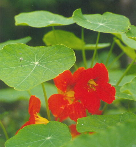 Tropaeolum majus (Tropaeolaceae)